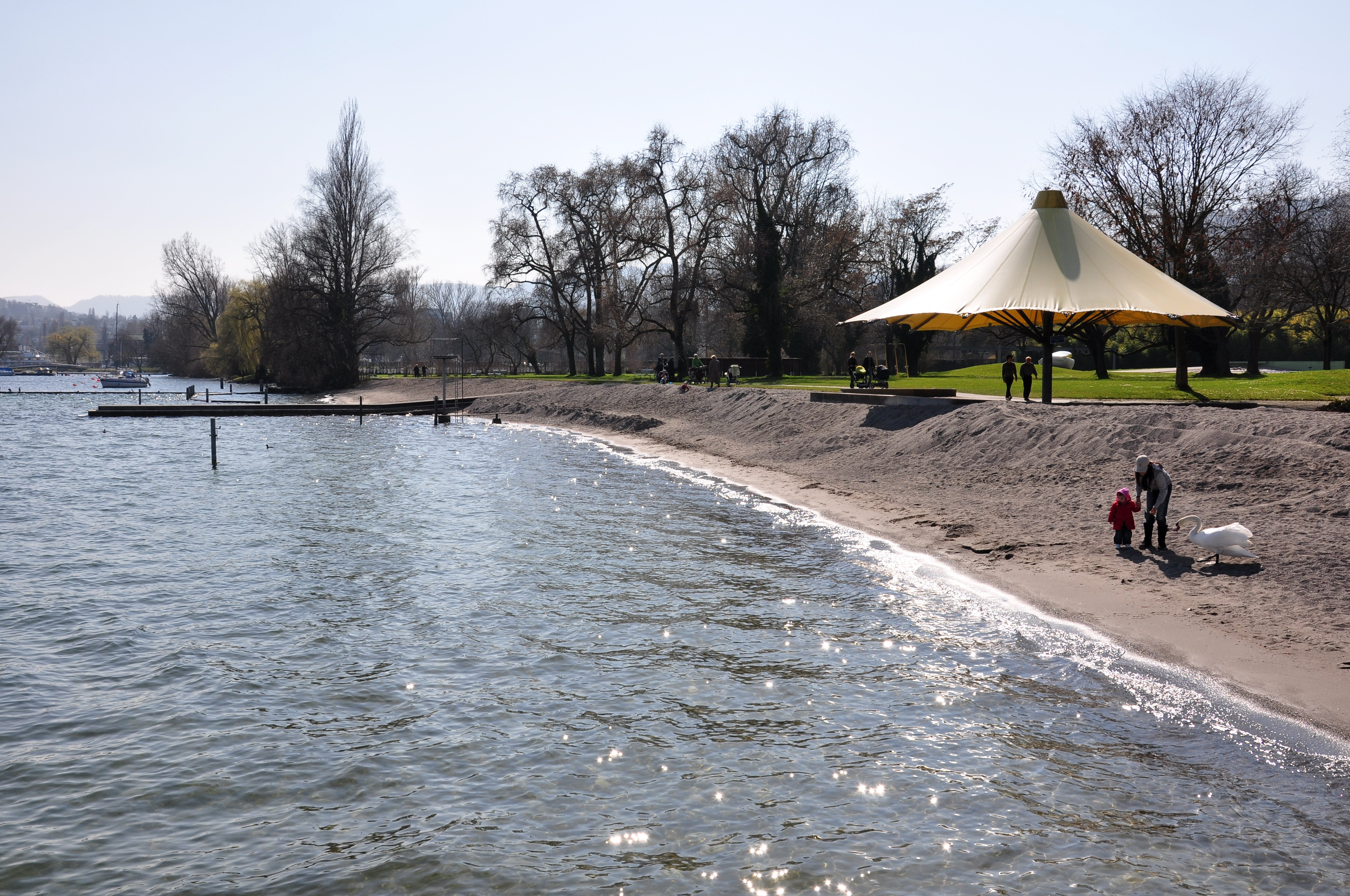 Strandbad Mythenquai in Zürich-Wollishofen (Switzerland)